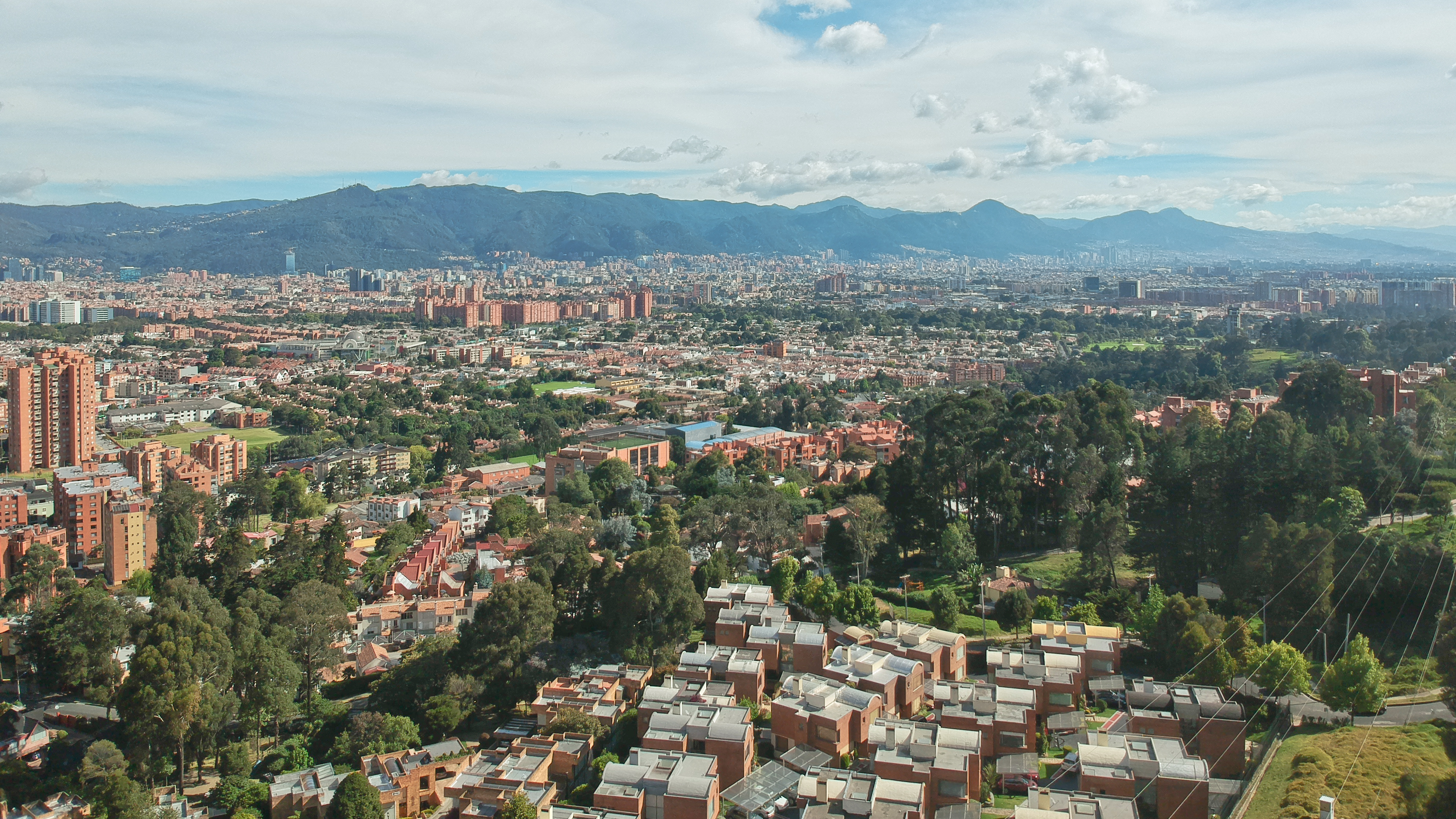 Panorama de Bogotá